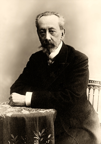 А. А. Иностранцев